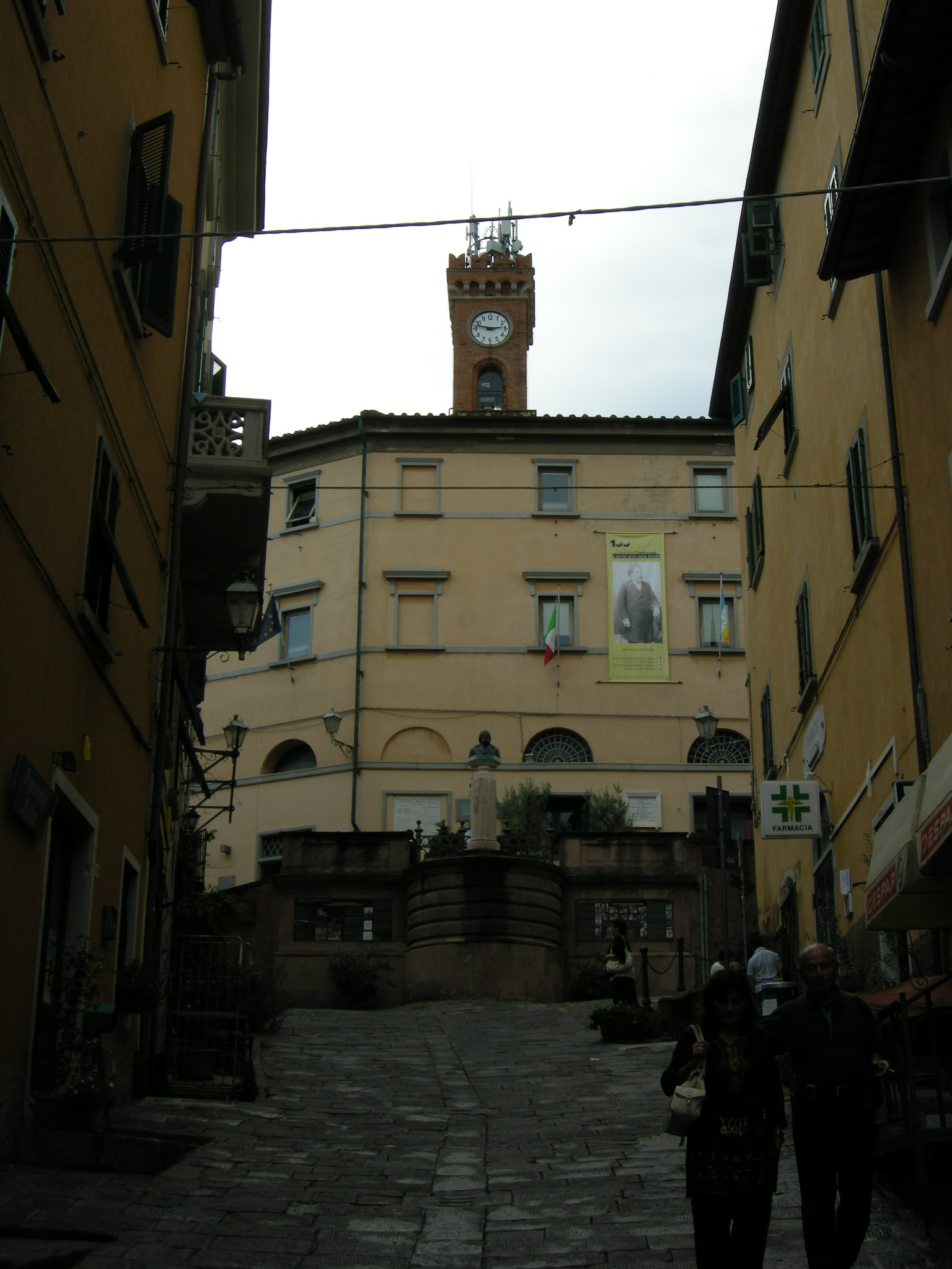 Castagneto Carducci, comune